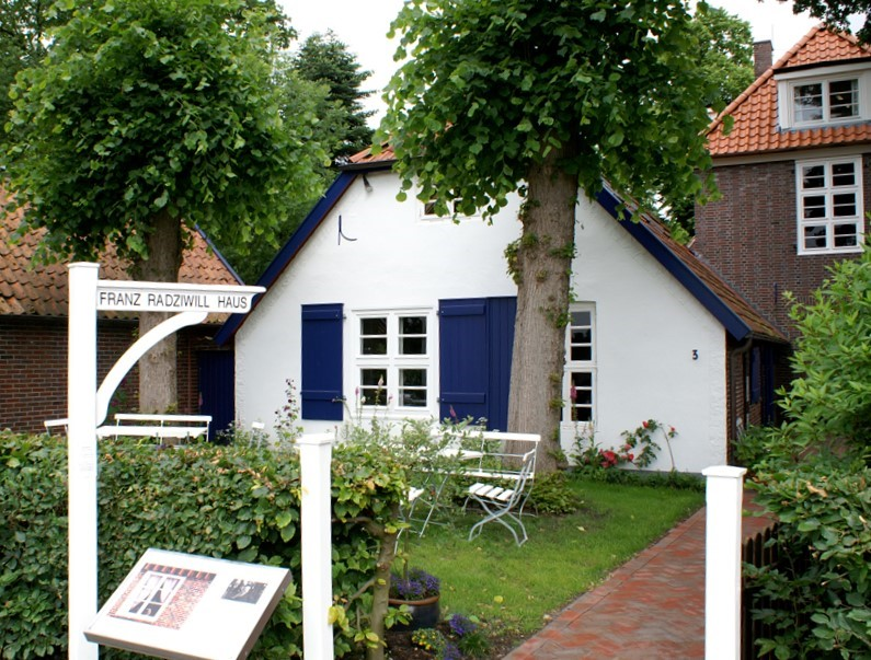 Das Franz Radziwill Haus in der Sielstraße 3 im Künstlerort Dangast a, Jadebusen.